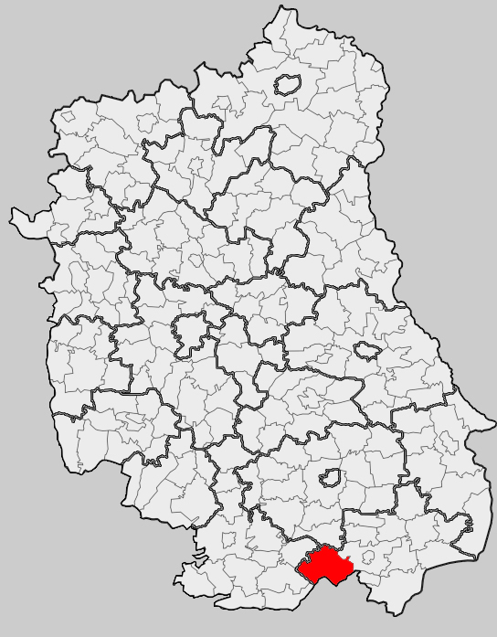 Map of gmina Susiec, Tomaszów Lubelski county, Lublin voivodship Mapa gminy Susiec, powiat tomaszowski, województwo lubelskie